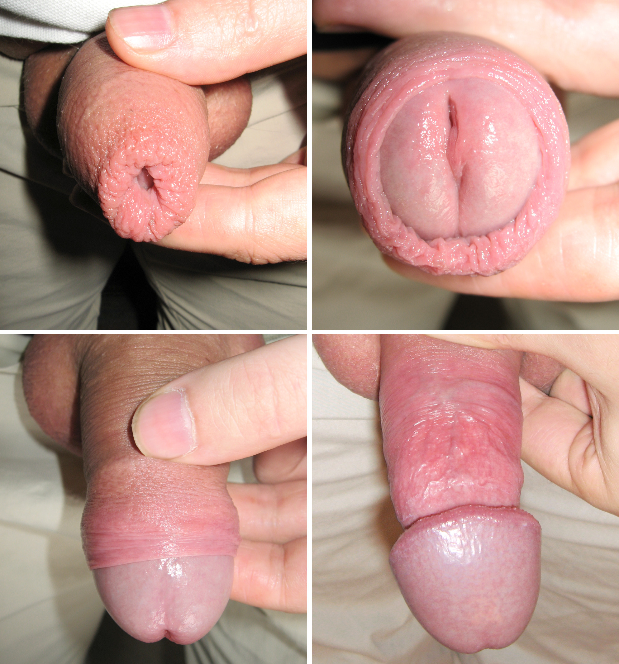 Male foreskin being retracted.